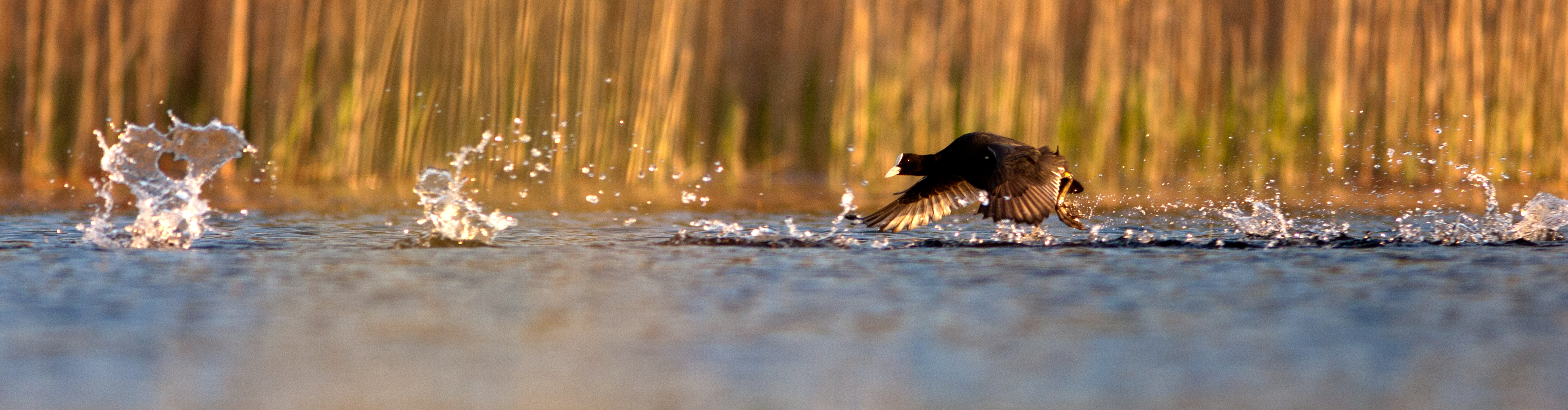 Laukude (Fulica atra) efektne tagaajamine roostikus.